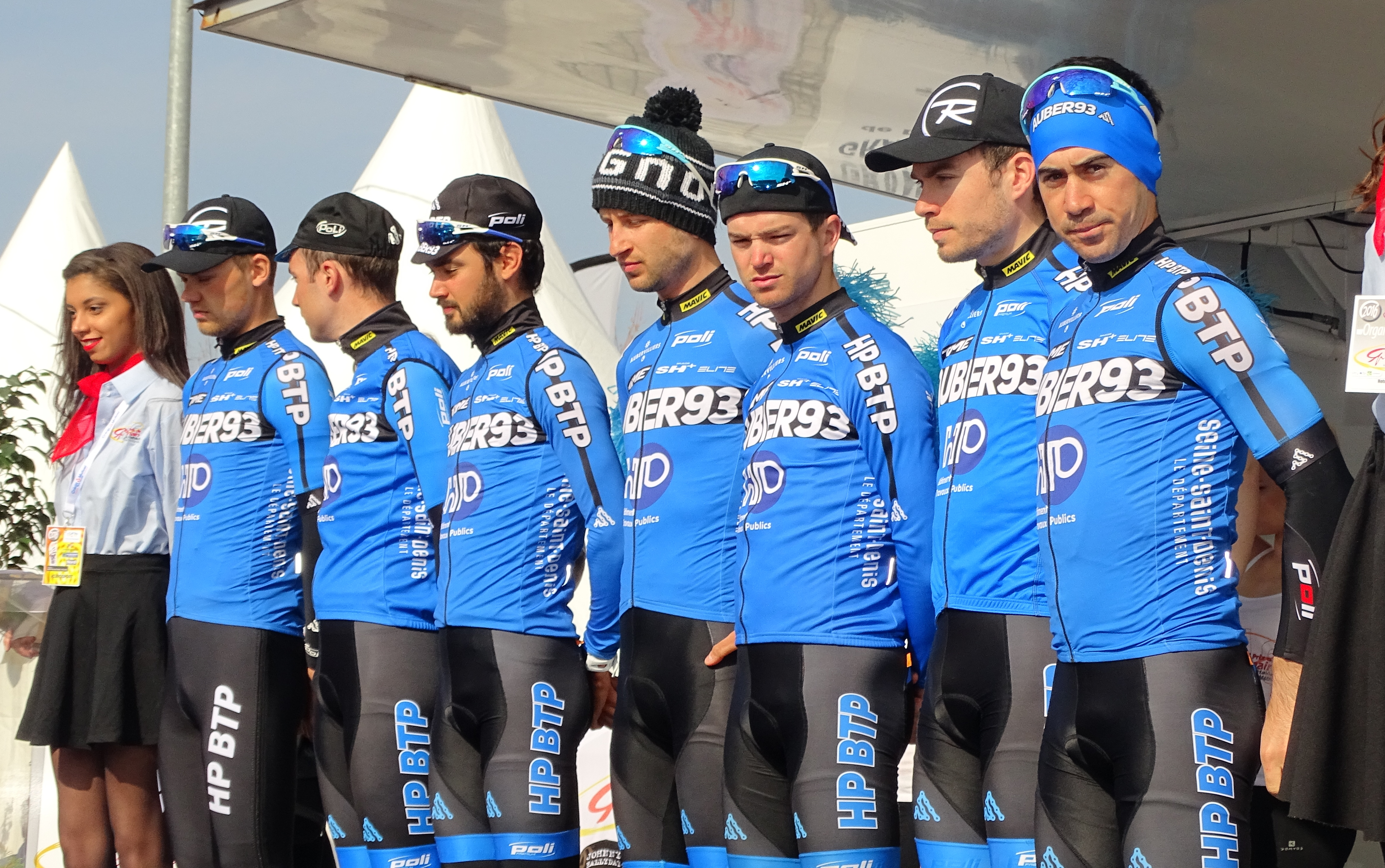 Reportage réalisé le jeudi 14 avril à l'occasion du départ et de l'arrivée du Grand Prix de Denain 2016 à Denain, Nord, Nord-Pas-de-Calais-Picardie, France.